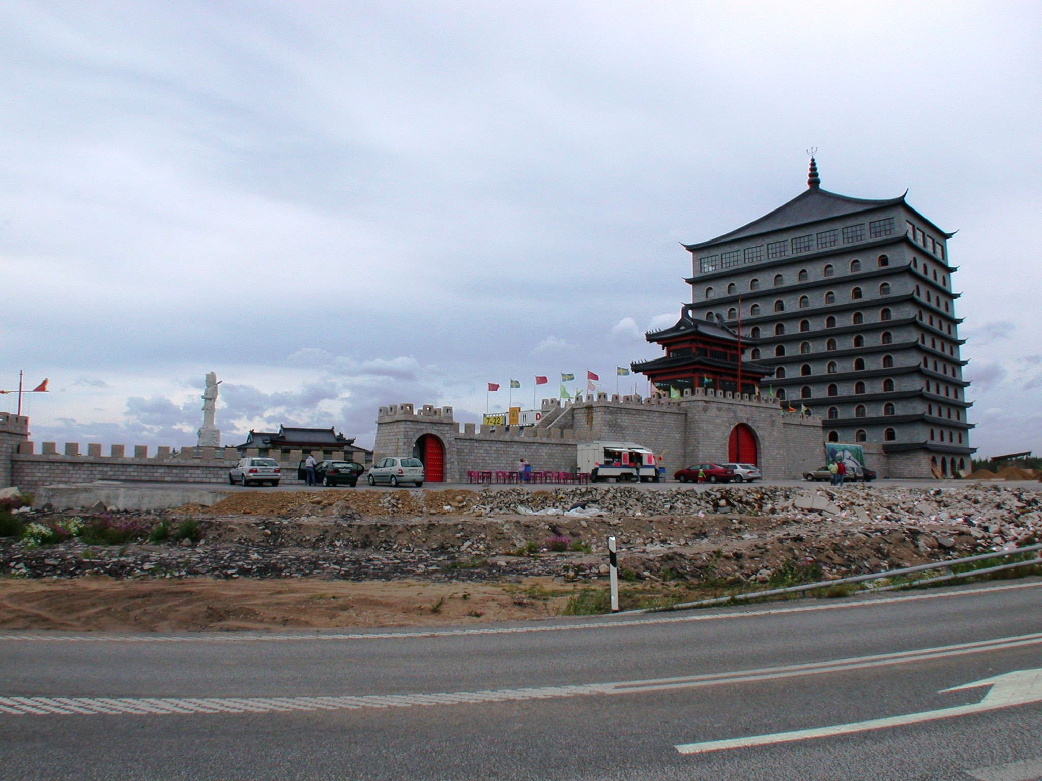 Dragon Gate, Älvkarleby, Sweden